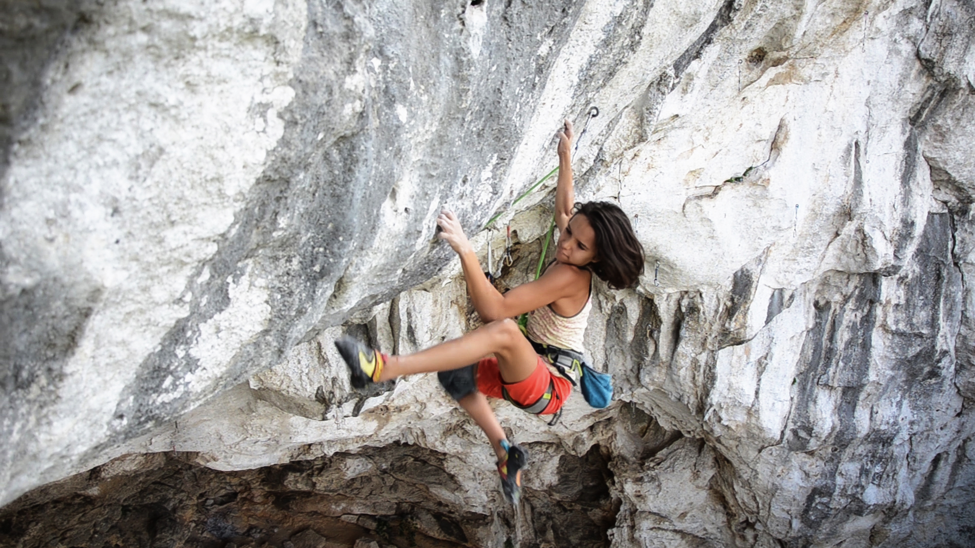 Oriane Bertone, Giravuelta (Finale Ligure). 8a Flash